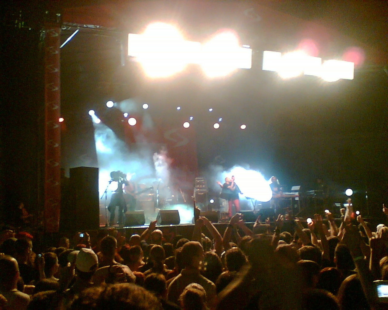 Hladno Pivo Exit Festival Novi Sad Petrovaradinska Tvrdjava